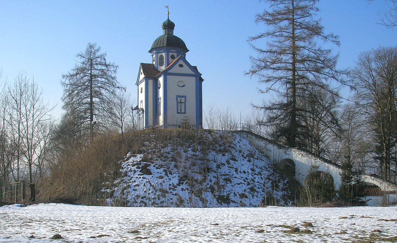 Gesamtansicht der Hauptburg mit der Kapelle.